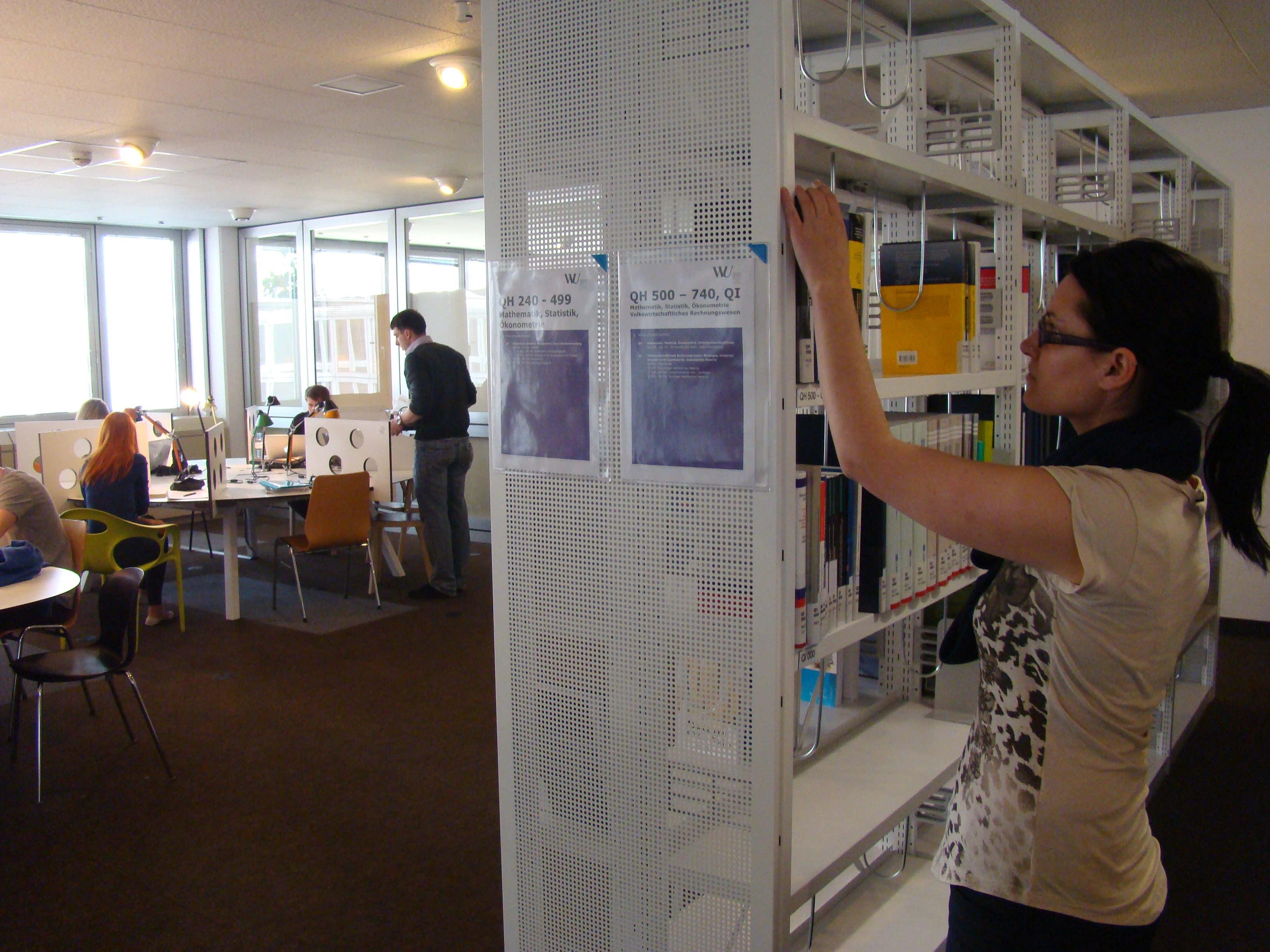 Der Lesesaal der Bibliothek, Mai 2011